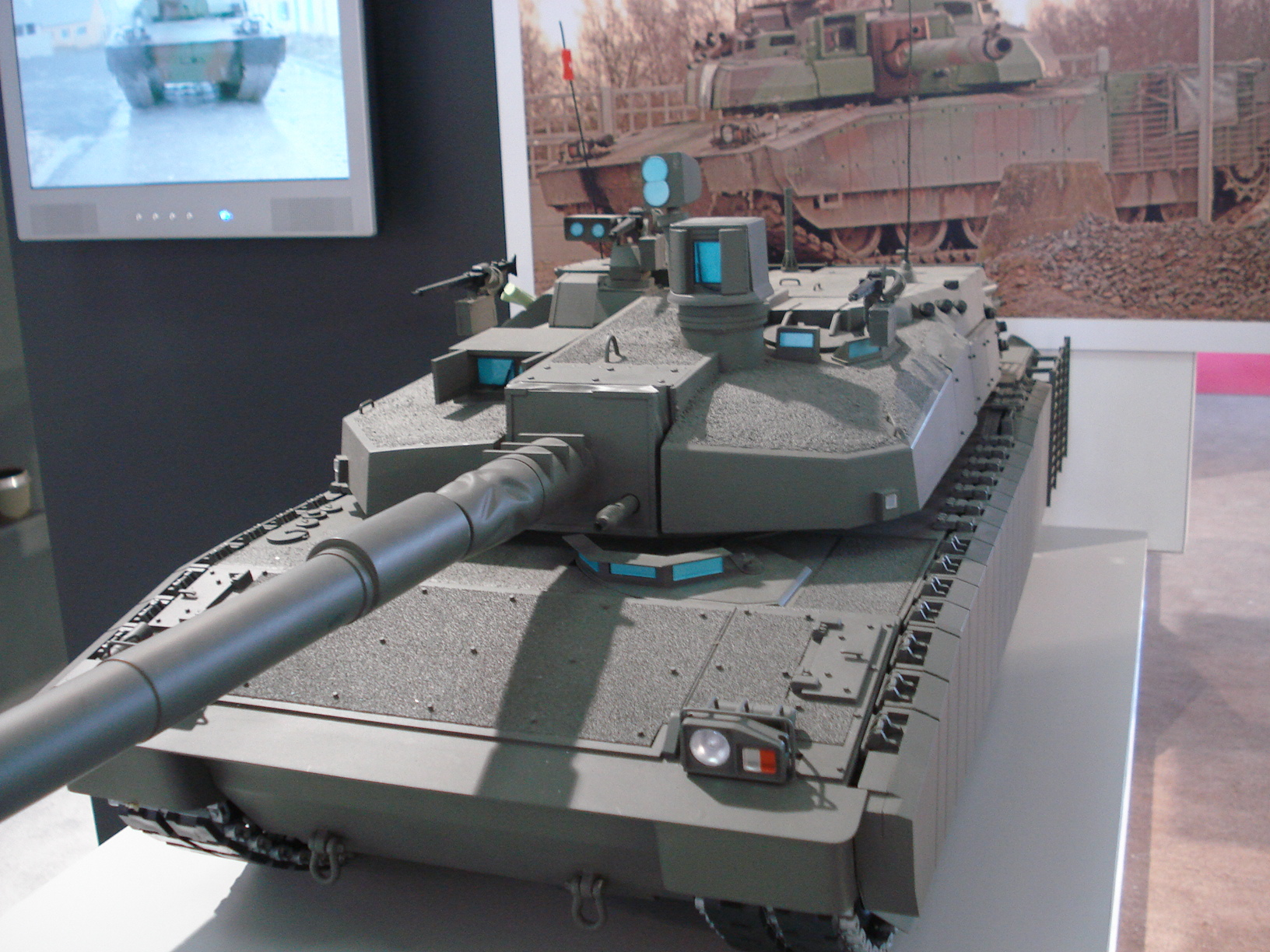 IDEF '07 Savunma Fuarı'nda çekildi.Turk Leclerc detay.23 Mayıs 2007